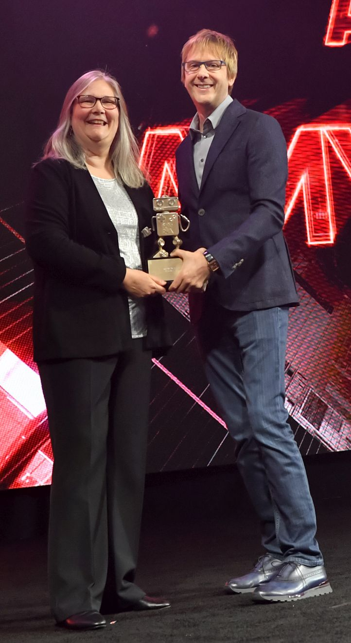 1D5_5645